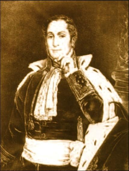 El Marqués Aymar de Dampierre, Par de Francia.